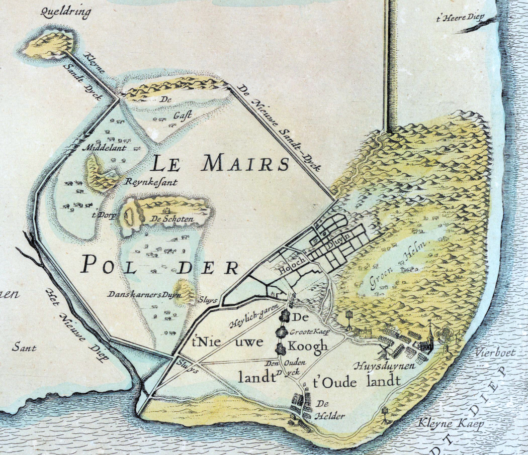 Kaart van Koegras (en Huisduinen) Kaerte van alle de Sanden, Gorsingen, Slicken, Waerden ende Kreecken, gelegen tusschen Huysduynen, Wieringen, Wieringerwaerdt, Zyp ende Kalands-Ooge, genaemt het Koegras, in dewelcke d'Erfgenamen van Sal. Isaac le Maire, als eygenaers van de gronden gelegen onder 't resort van Huysduynen van meininge zijn (volgens haer Octroy) uyt te geven ende te bedijcken De Polder van Le Maire, alhier afgebeelt. Getekend op een schaal van 1000 Rijnlandse Roeden.